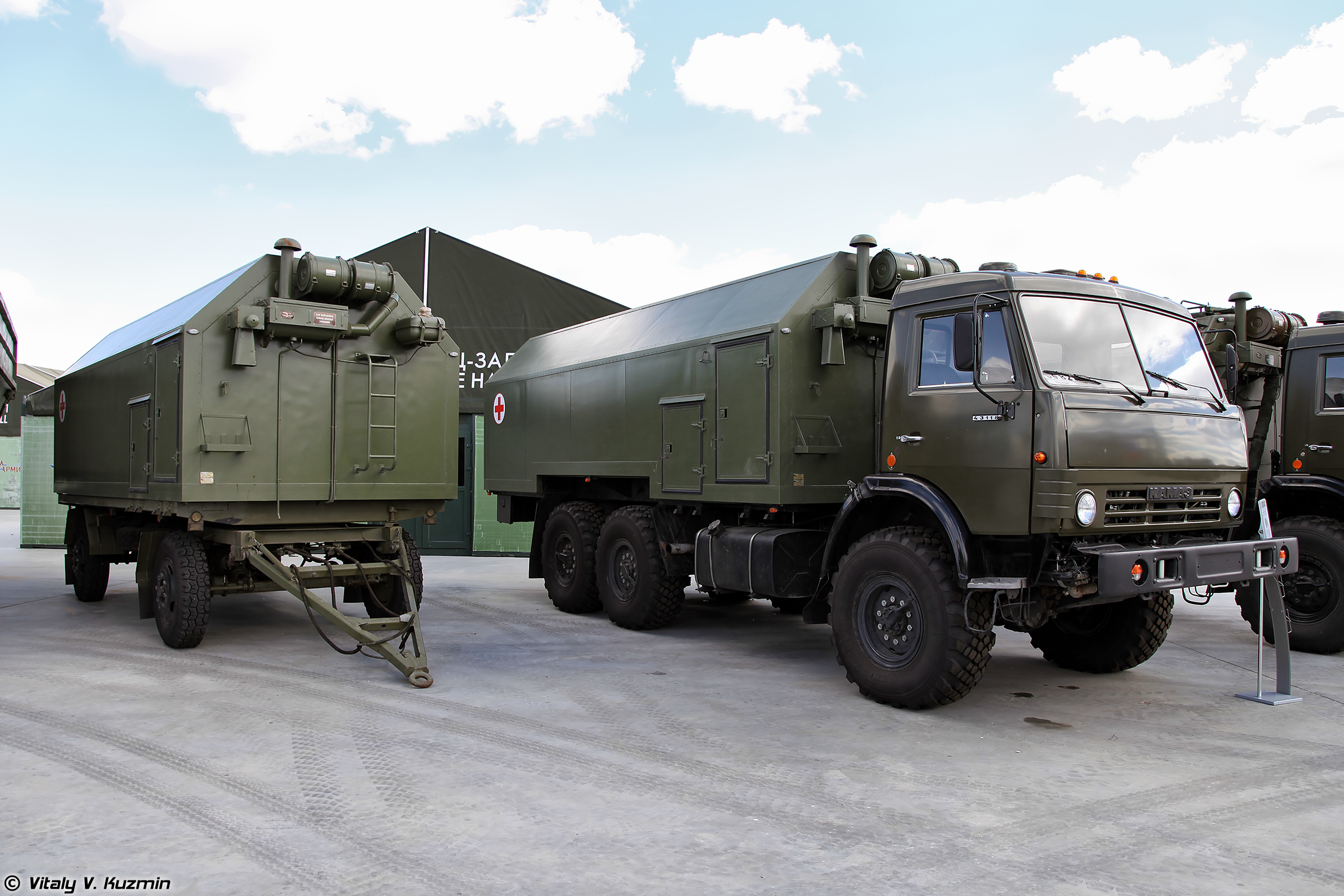 Комплекс дезинфекционно-душевой ДДК-01 на шасси КАМАЗ-43118 (DDK-01 disinfection-shower complex on KAMAZ-43118 chassis)